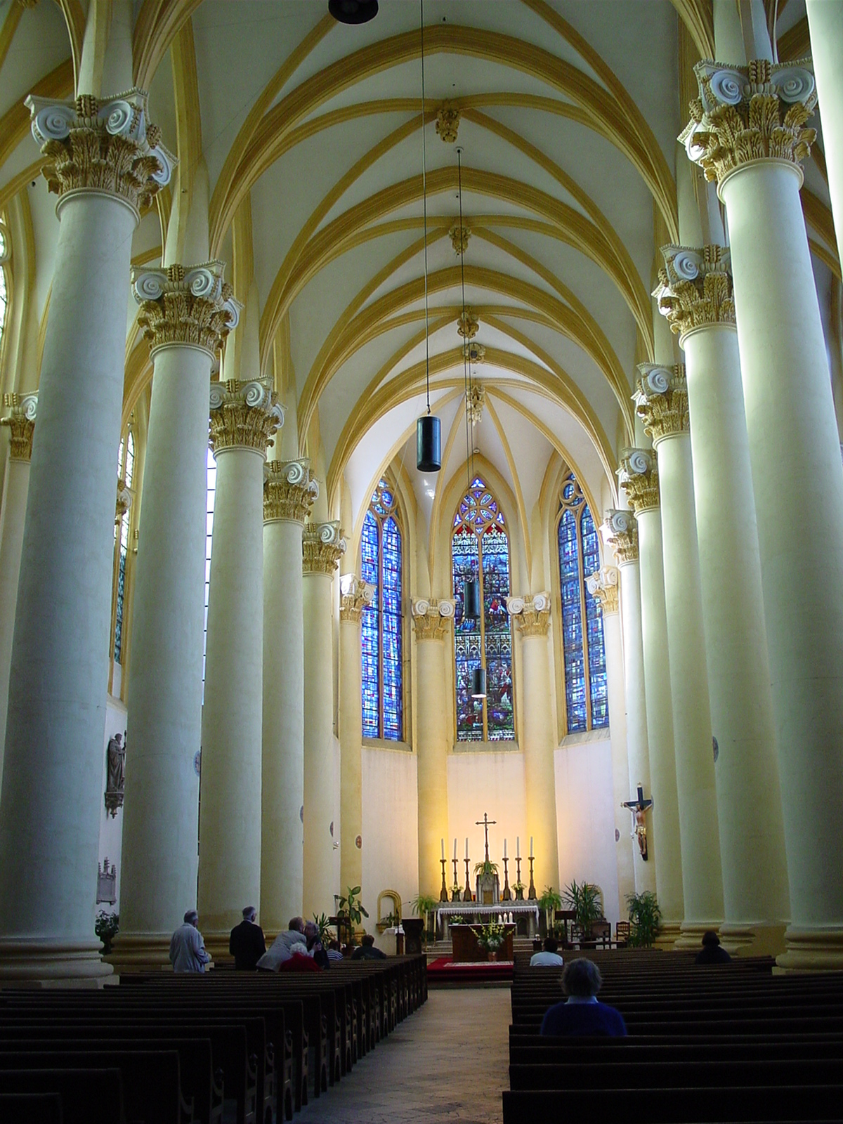 Eglise Saint-Clément de Metz, nef et coeur. .